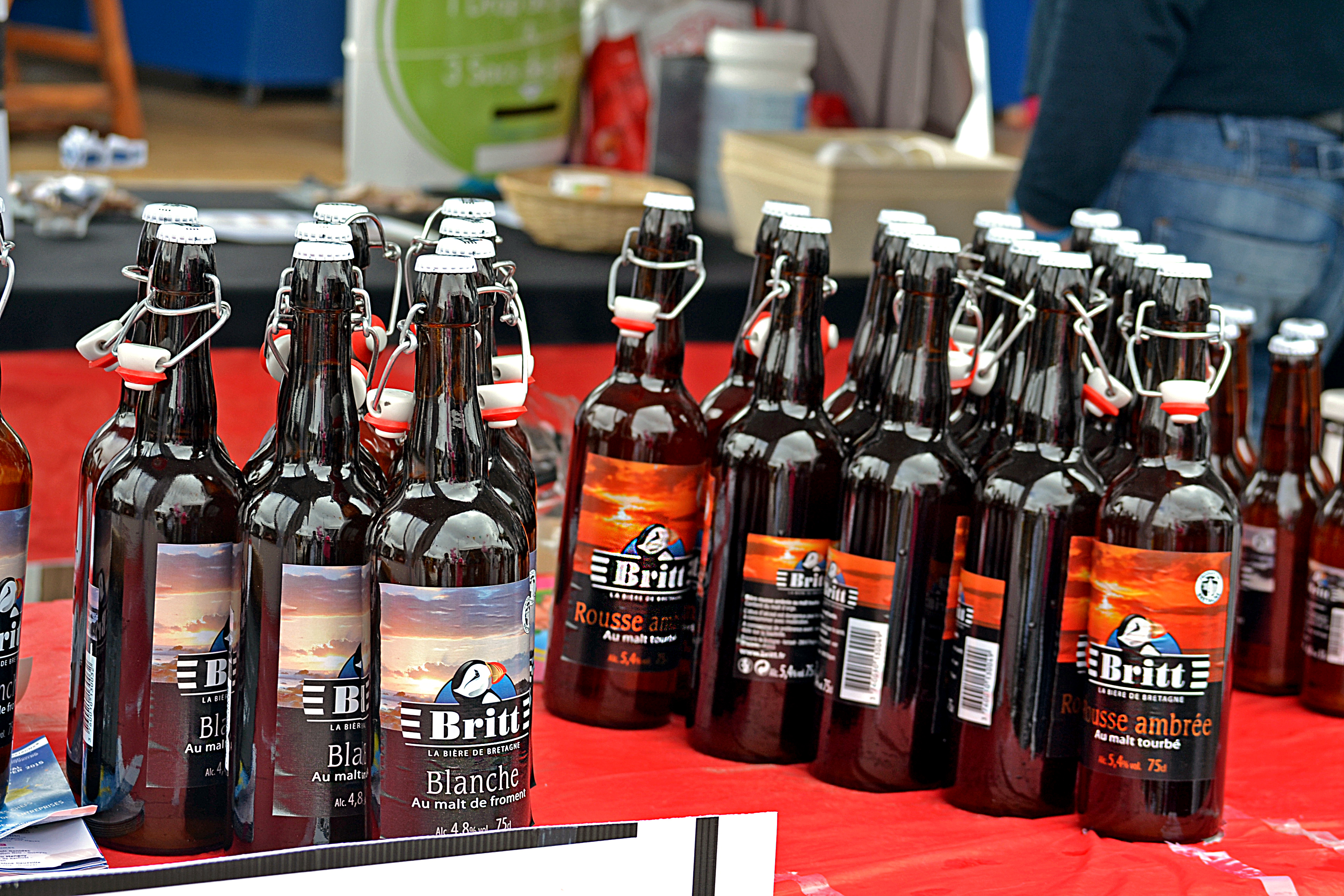 Cornouaille Gourmand place de la Résistance avec la dégustation de produits bretons lors du festival de Cornouaille 2015 à Quimper (Kemper).